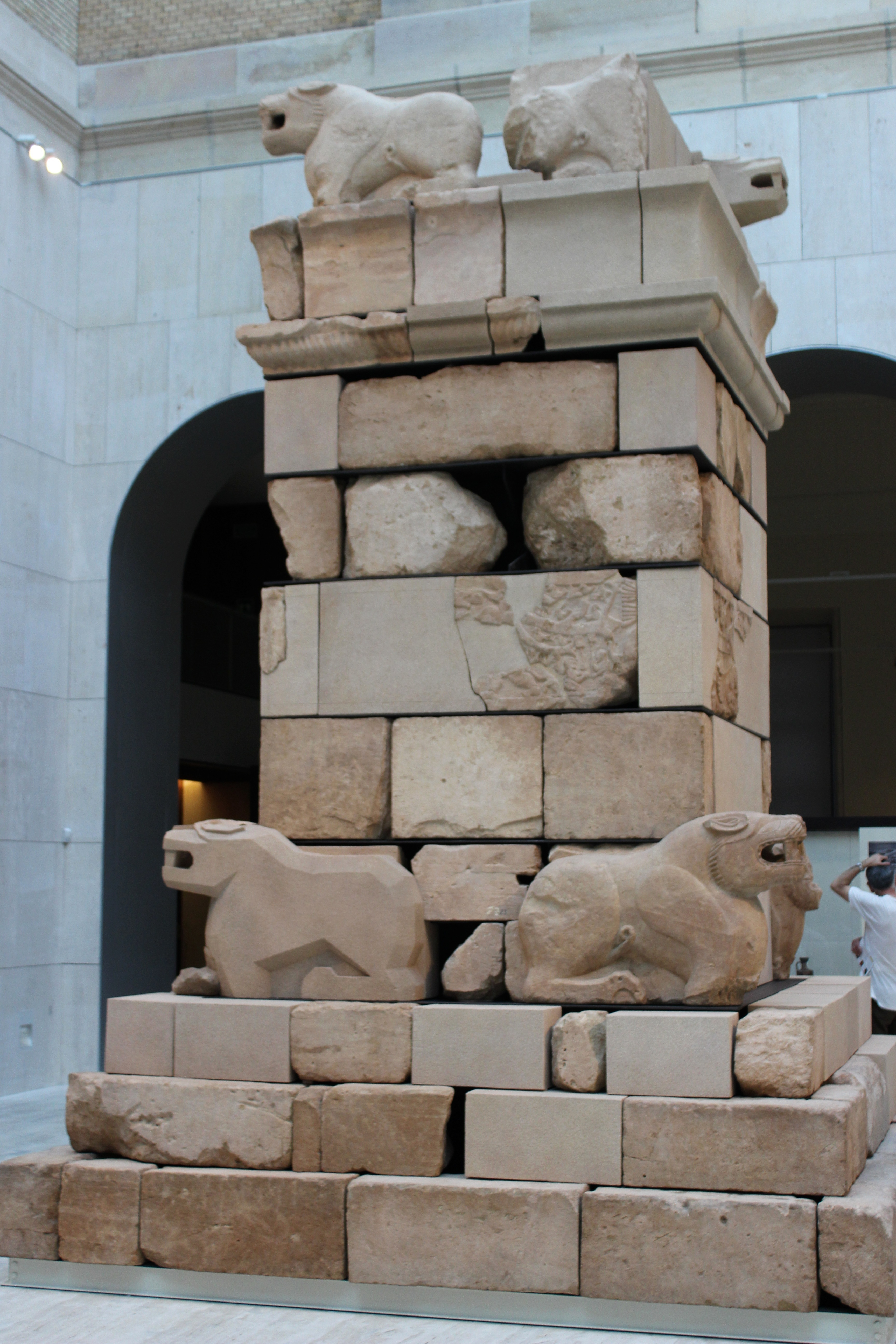 Madrid, Museo Arqueológico Nacional. Monumento de Pozo Moro.